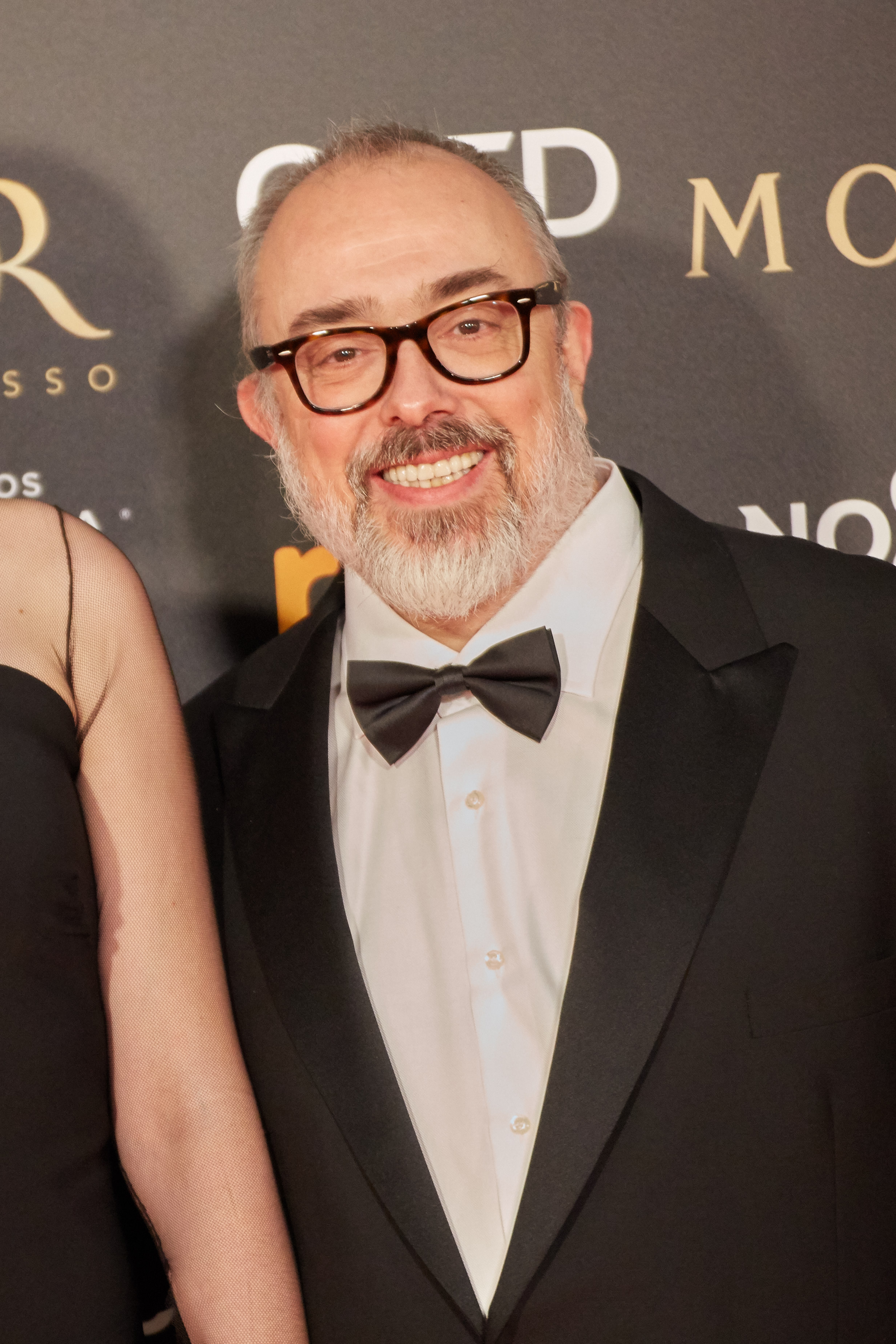 Alex de la Iglesia en la alfombra roja de los Premios Goya celebrados en Sevilla en Febrero 2019